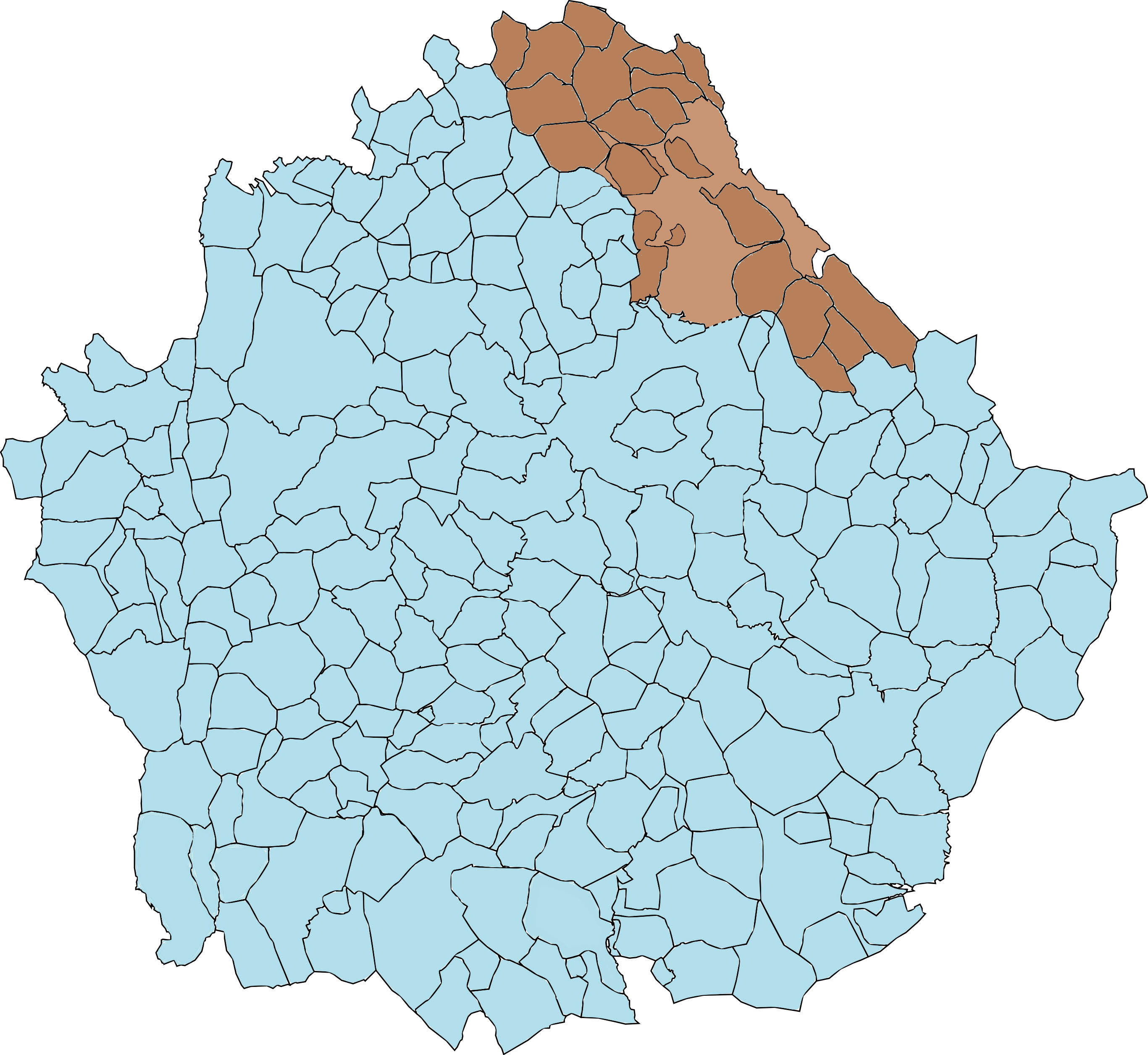 Comarca de la Serranía Alta